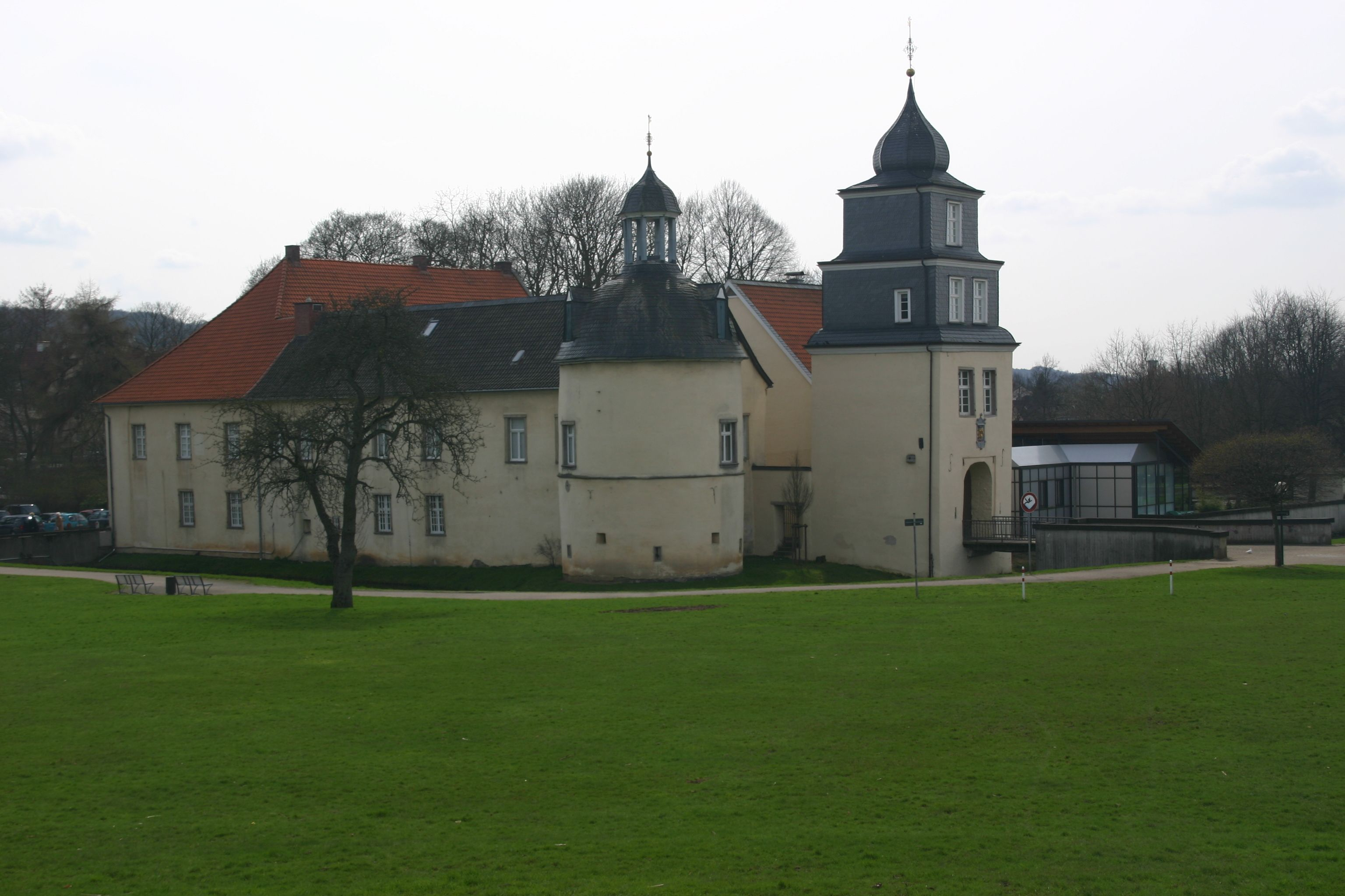 Schwelm Haus Martfeld Ansicht Wehrturm Torturm